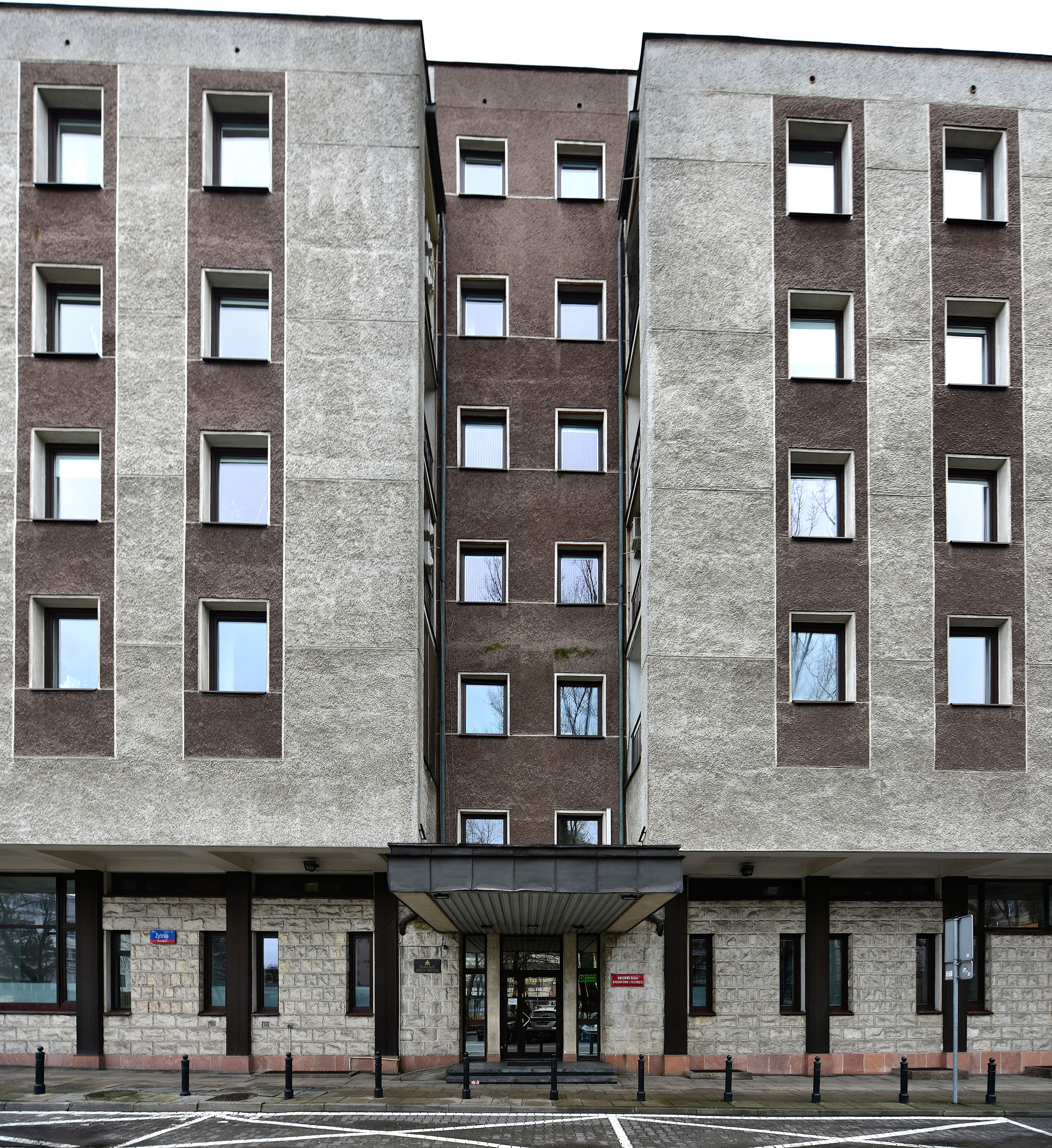 Siedziba Krajowej Rady Radiofonii i Telewizji na skwerze kard. S. Wyszyńskiego 9 (wejście główne od ul. Żytniej)